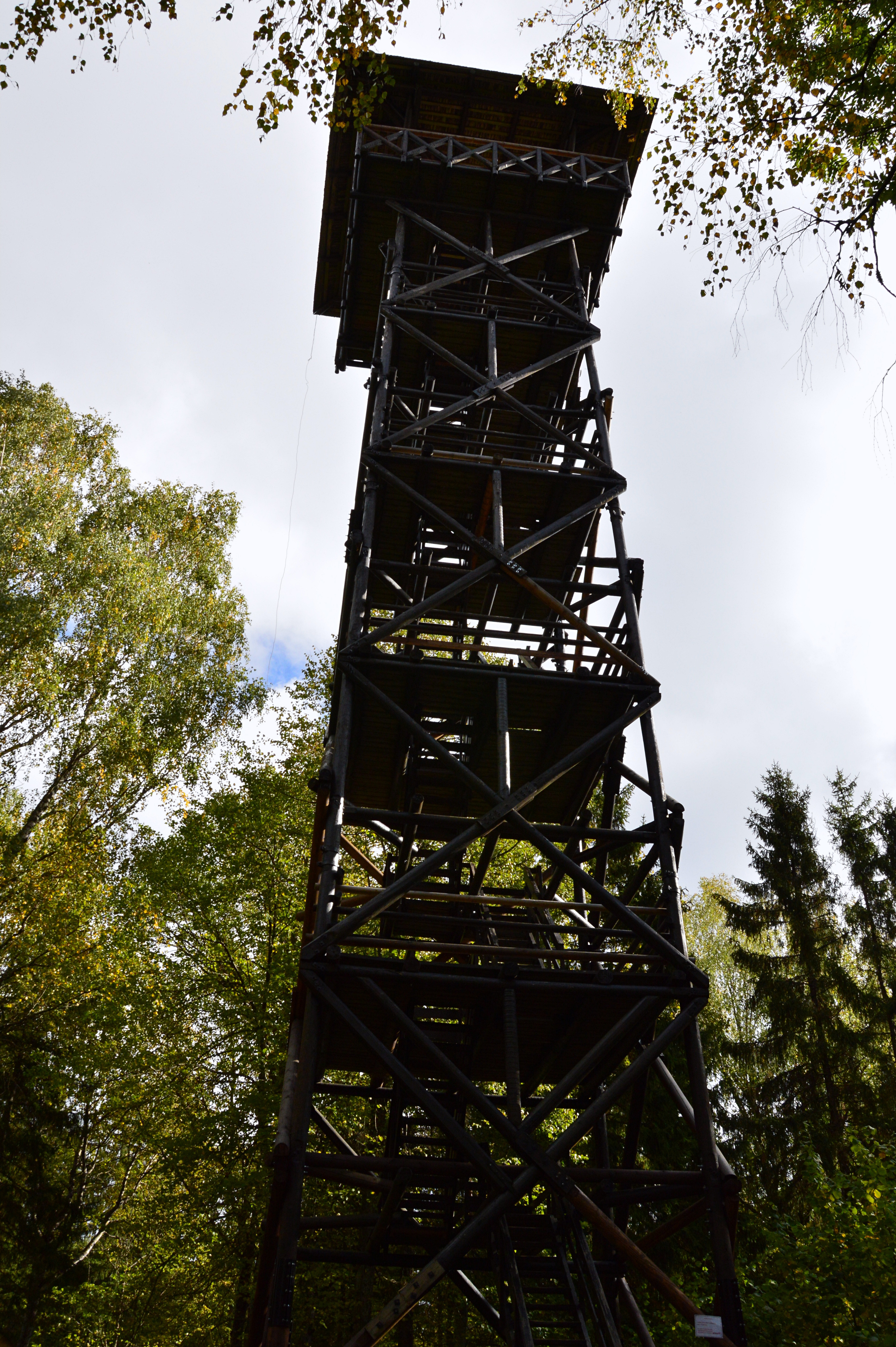 Iisaku vaatetorn.